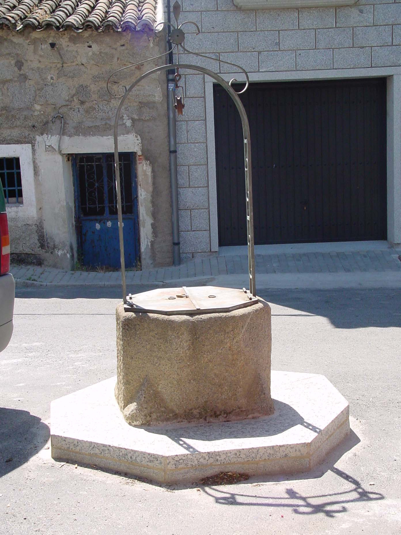 Pozo en Fresnedillas de la Oliva.